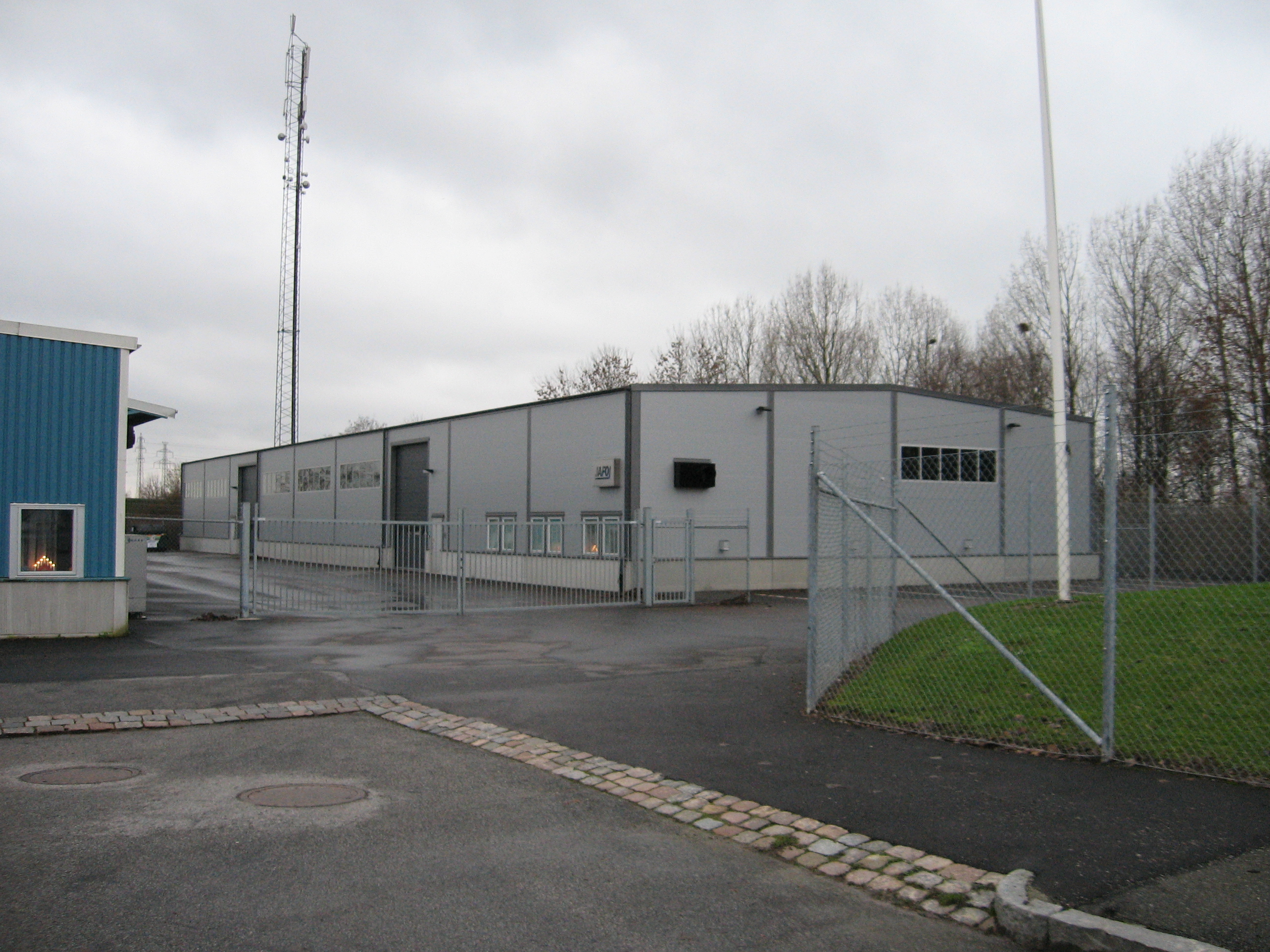 JAFO i Lund